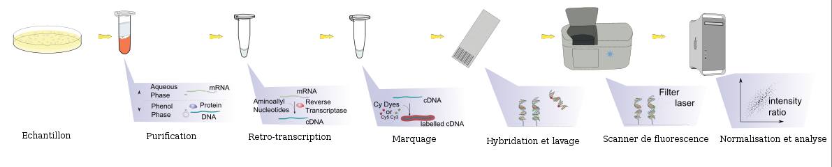 Les sept étapes qui permettent de réaliser une expérience biopuce.